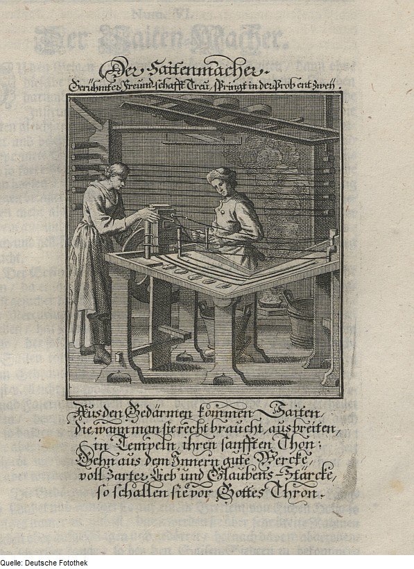 Original image description from the Deutsche Fotothek Ständebuch & Beruf & Handwerk & Musik & Saite